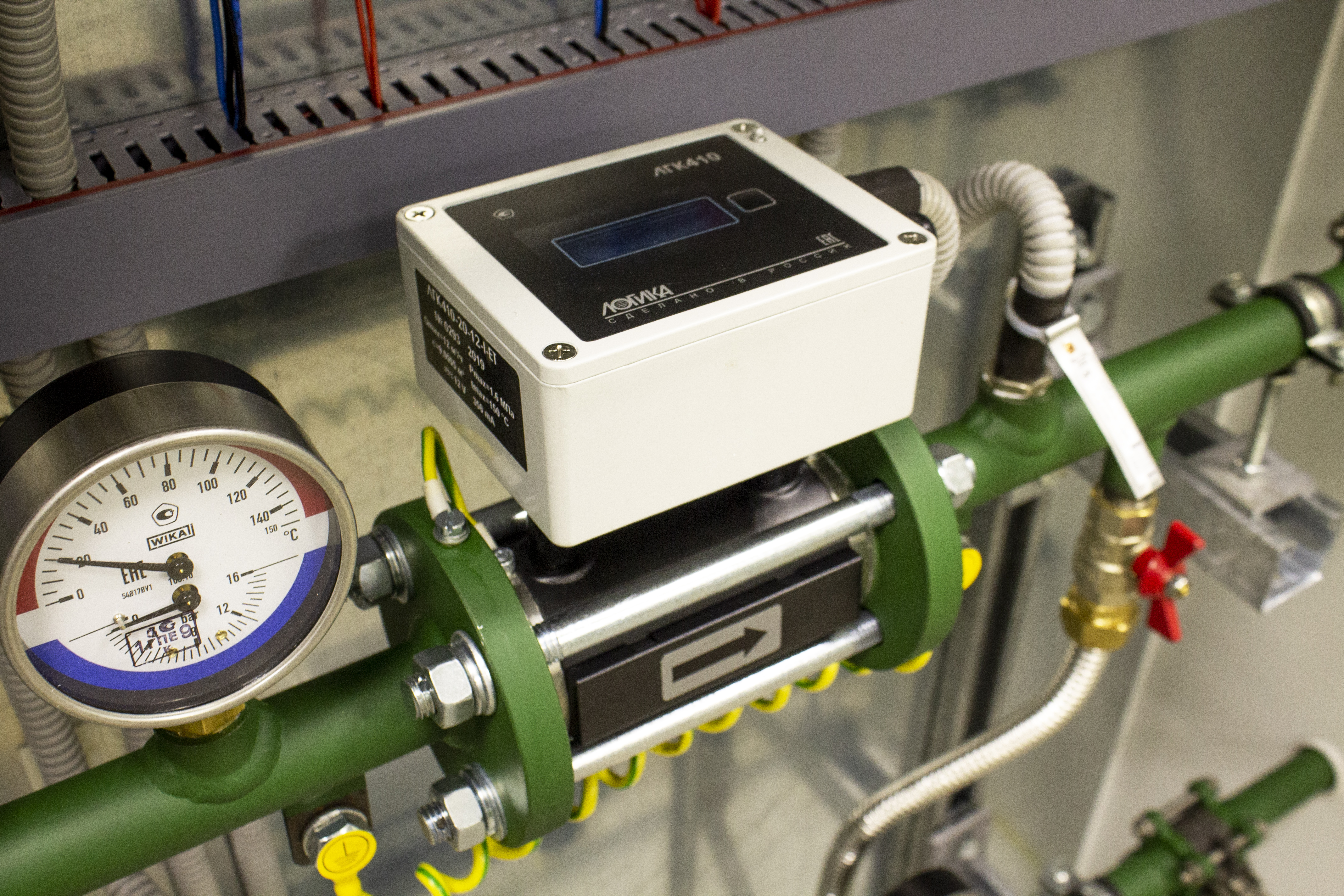 Электромагнитный расходомер ЛГК410